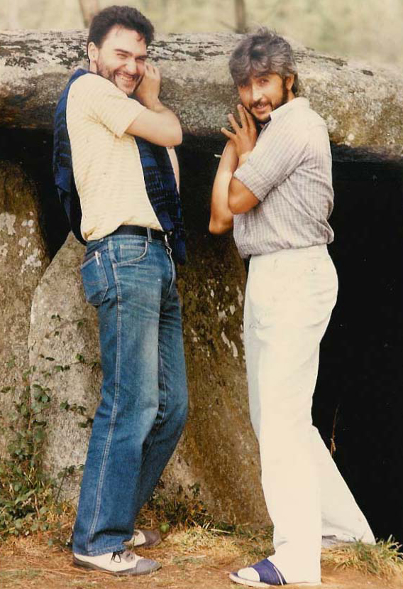 El dibujante Miguelanxo Prado y el guionista y músico Fernando Luna, durante una excursión por la provincia de A Coruña.